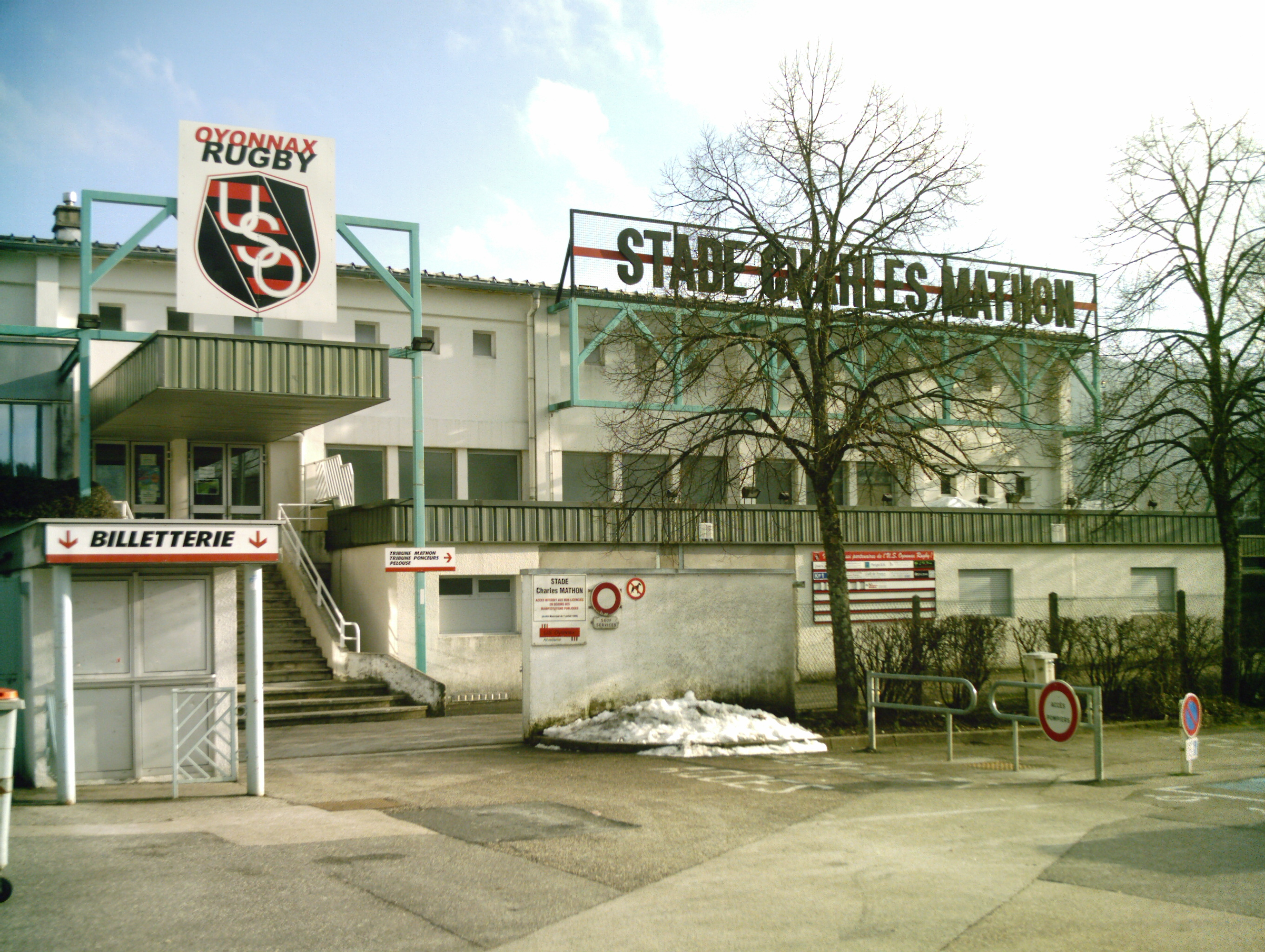 L'entrée principale du stade Charles Mathon à Oyonnax (Ain, FRANCE), avec vu de dos de la tribune présidentiel